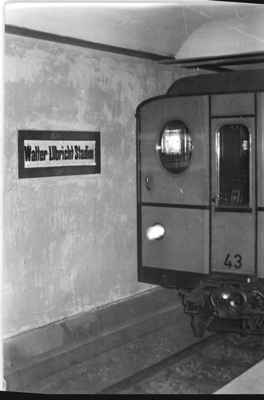 Illus-Quaschinsky 9.4.1951 U-Bahnhof "Walter-Ulbricht-Stadion". Am 9.4.1951 wurde der U-Bahnhof "Schwartzkopfstr." in Berlin in "Walter-Ulbricht-Stadion" umbenannt.